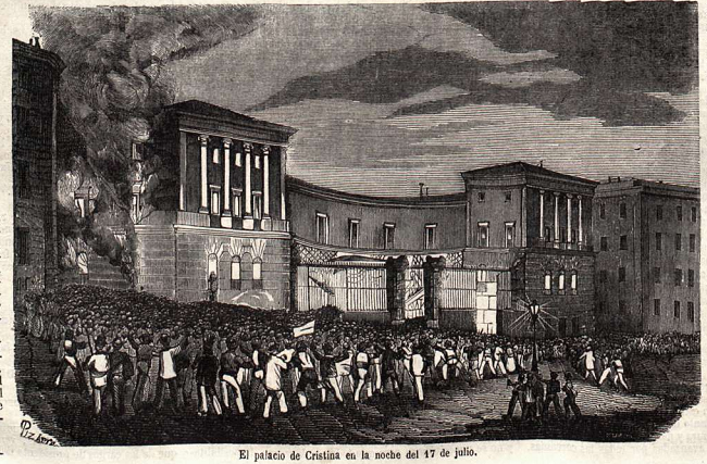 El palacio de Cristina en la noche del 17 de julio, en la revista española La Ilustración.